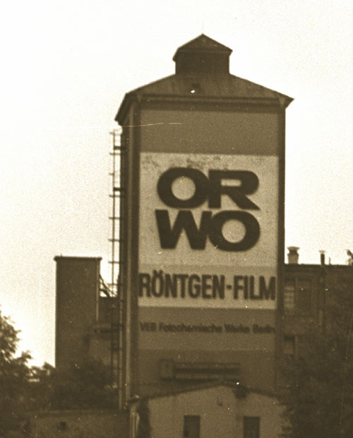 VEB Fotochemische Werke Berlin (in Köpenick). Fassaden-Werbung für ORWO-Röntgenfilm. Das Werk war 1927 von Kodak von der Glanzfilm AG übernommen worden. 1992 erhielt Kodak das Werk von der Treuhand zurück. Aufgenommen von einem Boot von der Müggelspree aus. Das Werk gehört mittlerweile der "Fotochemische Werke GmbH".